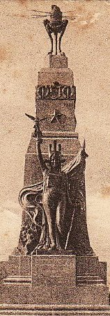 Monumento ai caduti della prima guerra mondiale (città di San Cataldo, provincia Caltanissetta)(3).jpg